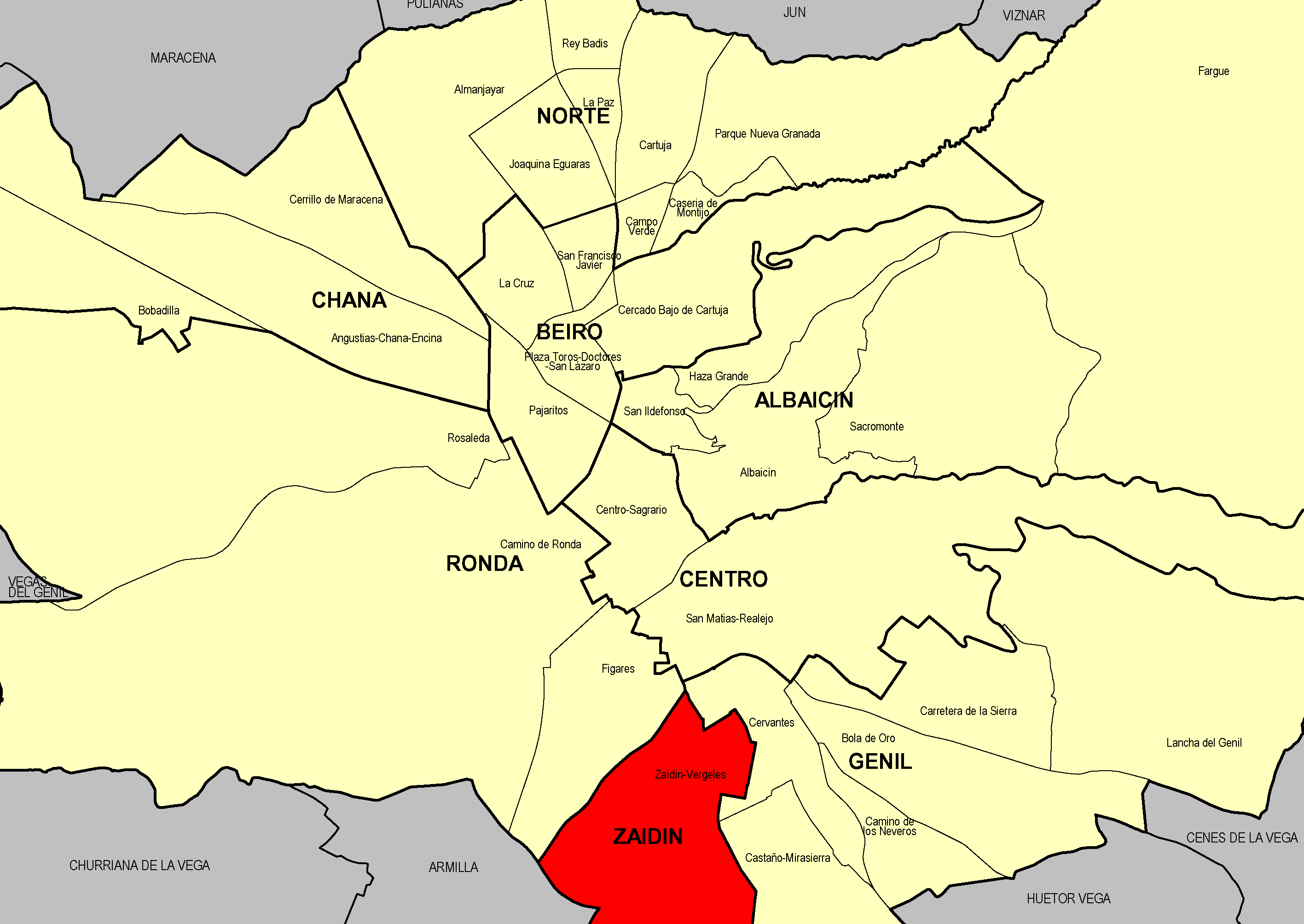 Barrio Zaidín-Vergeles y distrito Zaidín, en el municipio de Granada (Granada, España)